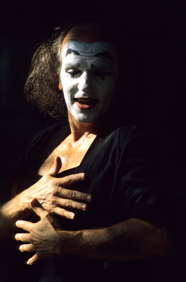 Peter Mim, Foto: Robert Skubacz